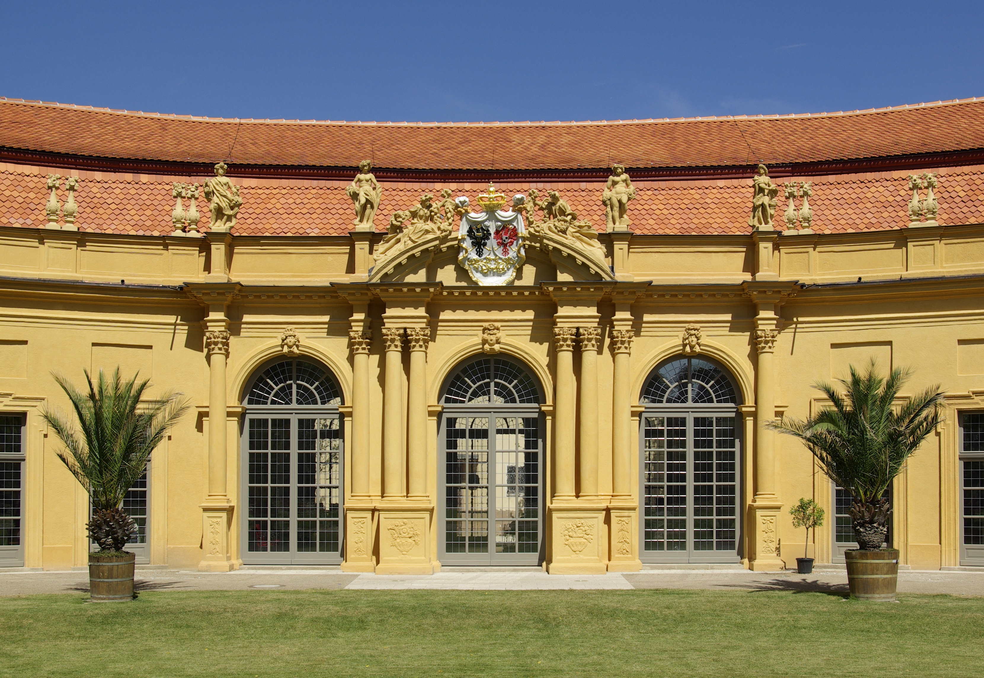 Die Orangerie im Schlossgarten in Erlangen